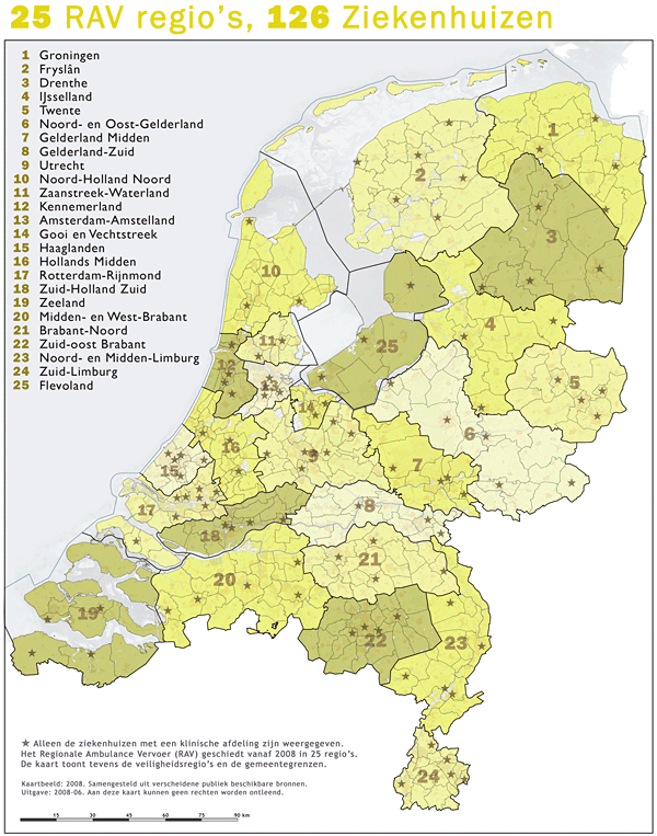 25 RAV (Regionaal Ambulance Vervoer) regio's en de 126 ziekenhuizen met klinische afdeling. Situatie 2008.